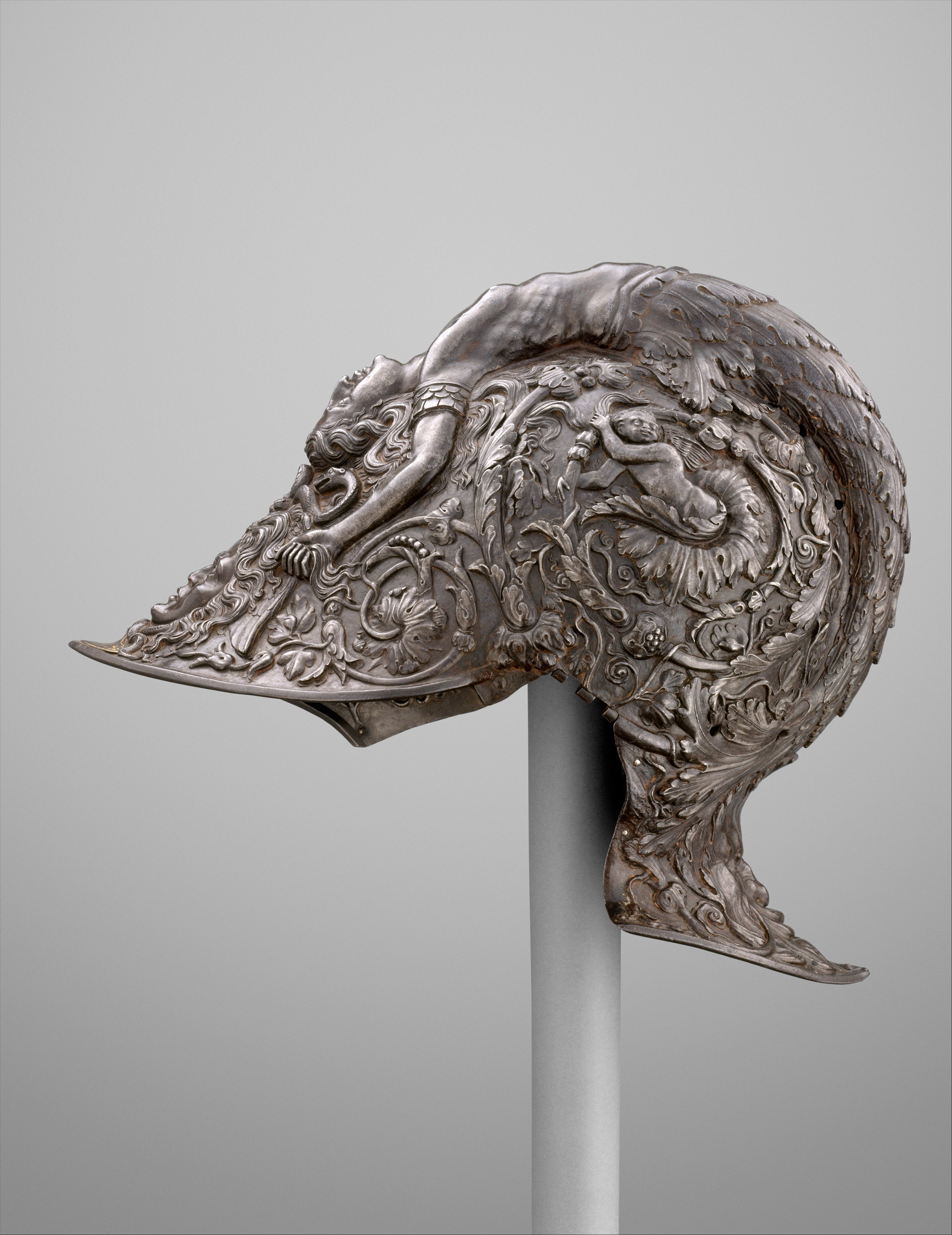 Burgonet; Italian, Milan; Helmets